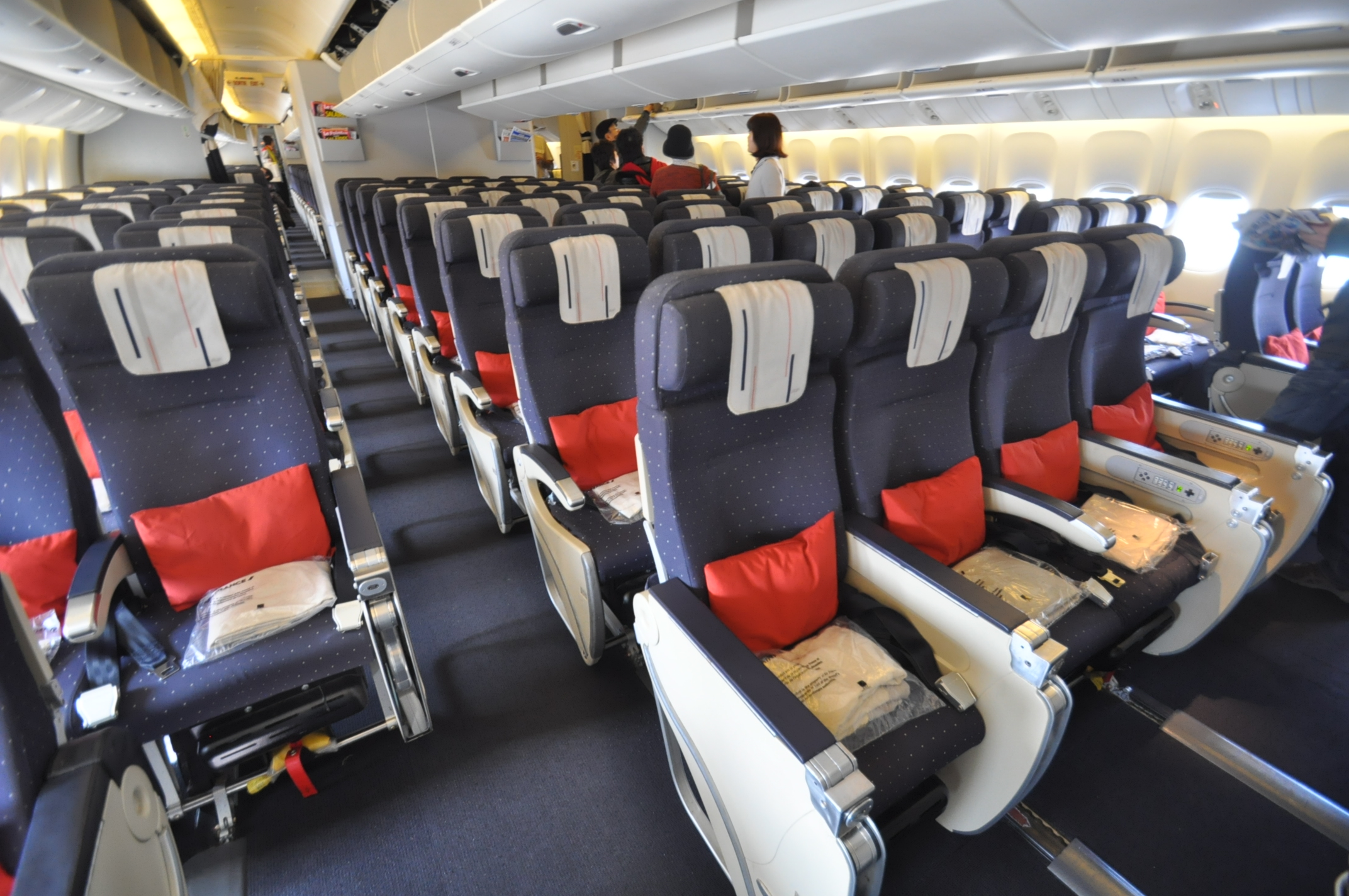 エールフランス航空エコノミークラス（Ｂ７７７－３００ＥＲ）